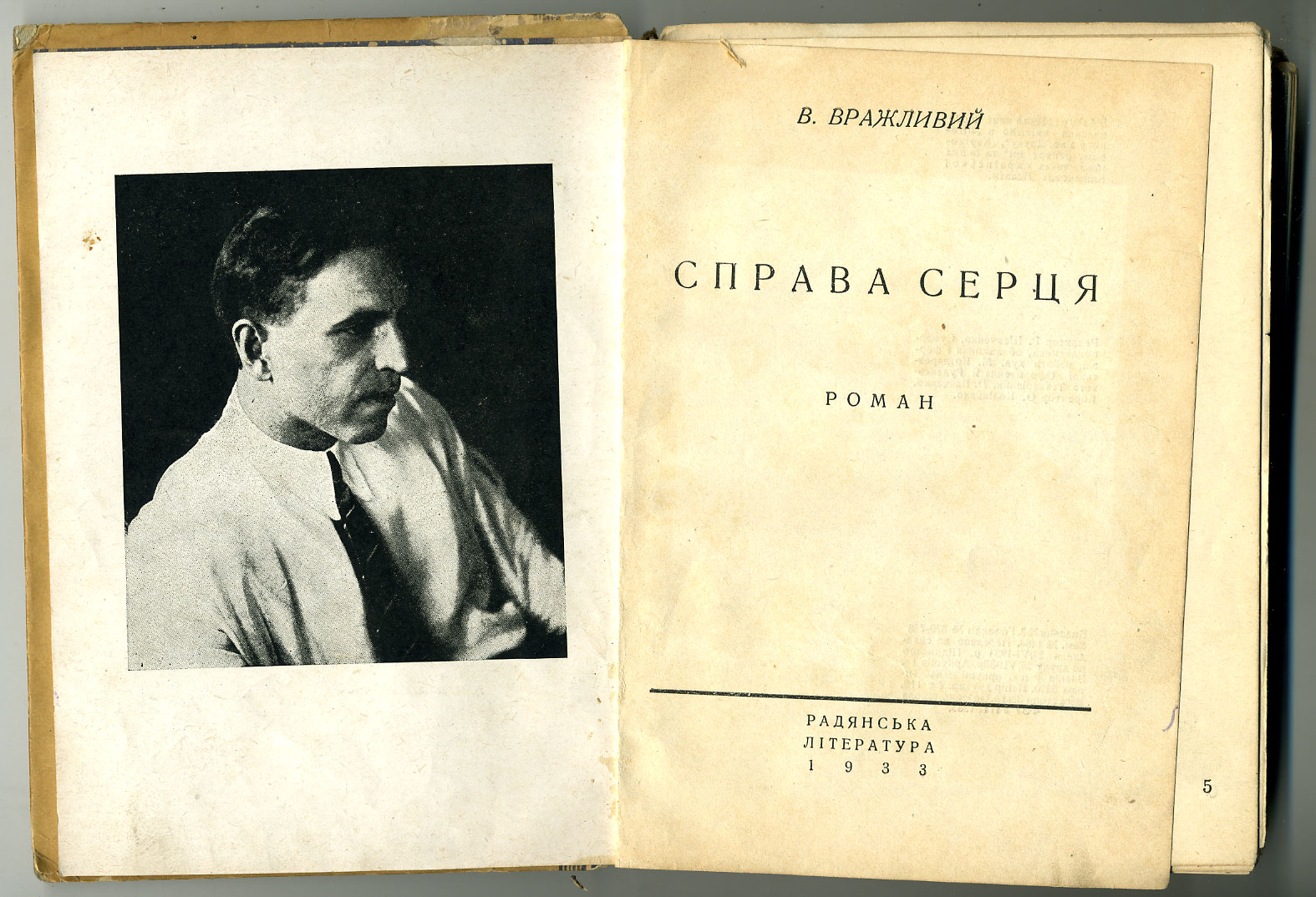 Василь Вражливый (настоящее имя и фамилия Василий Яковлевич Штанько) (1903 — 1937) — украинский советский писатель